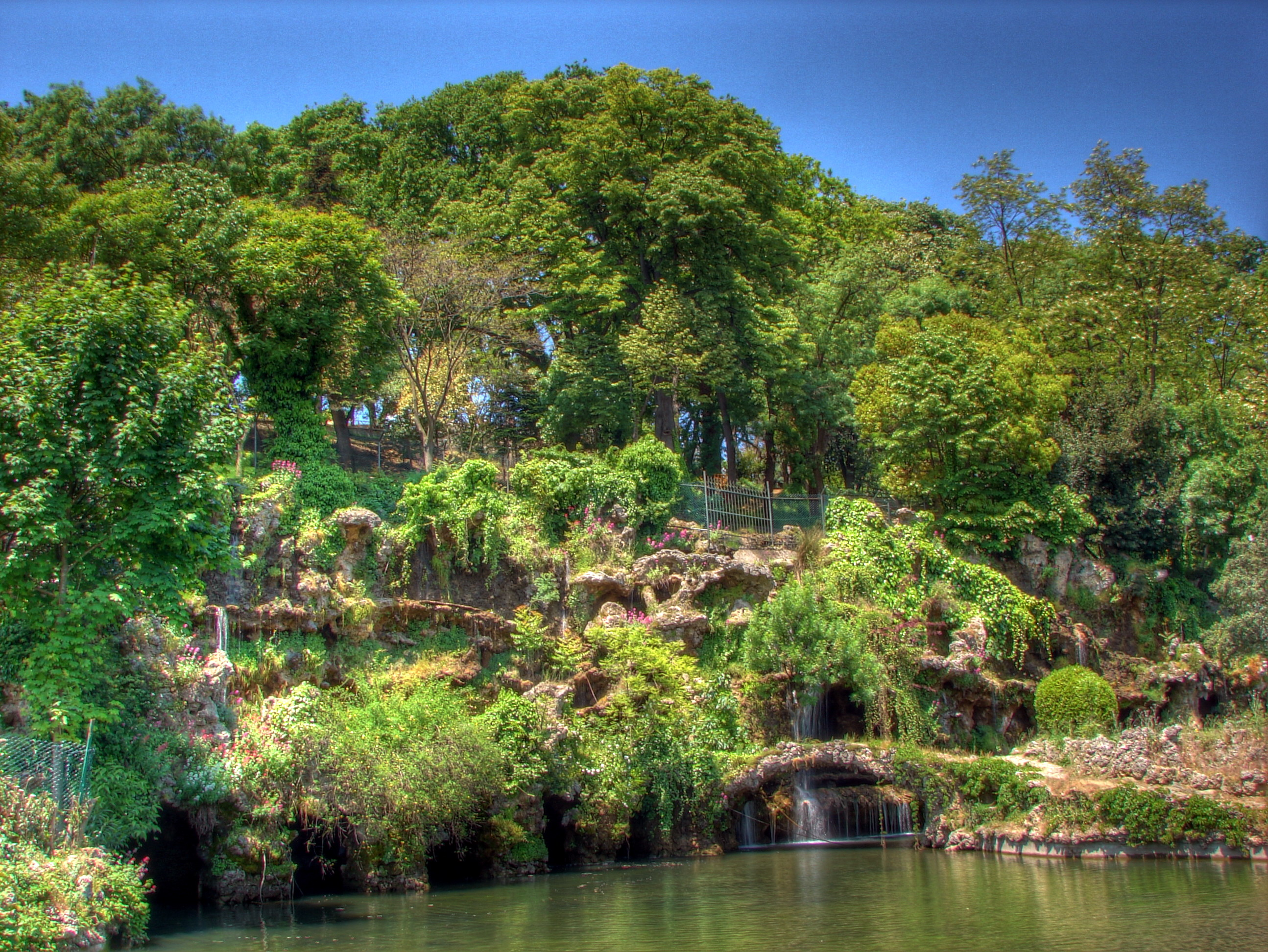 HDR, Emirgan park, Istanbul